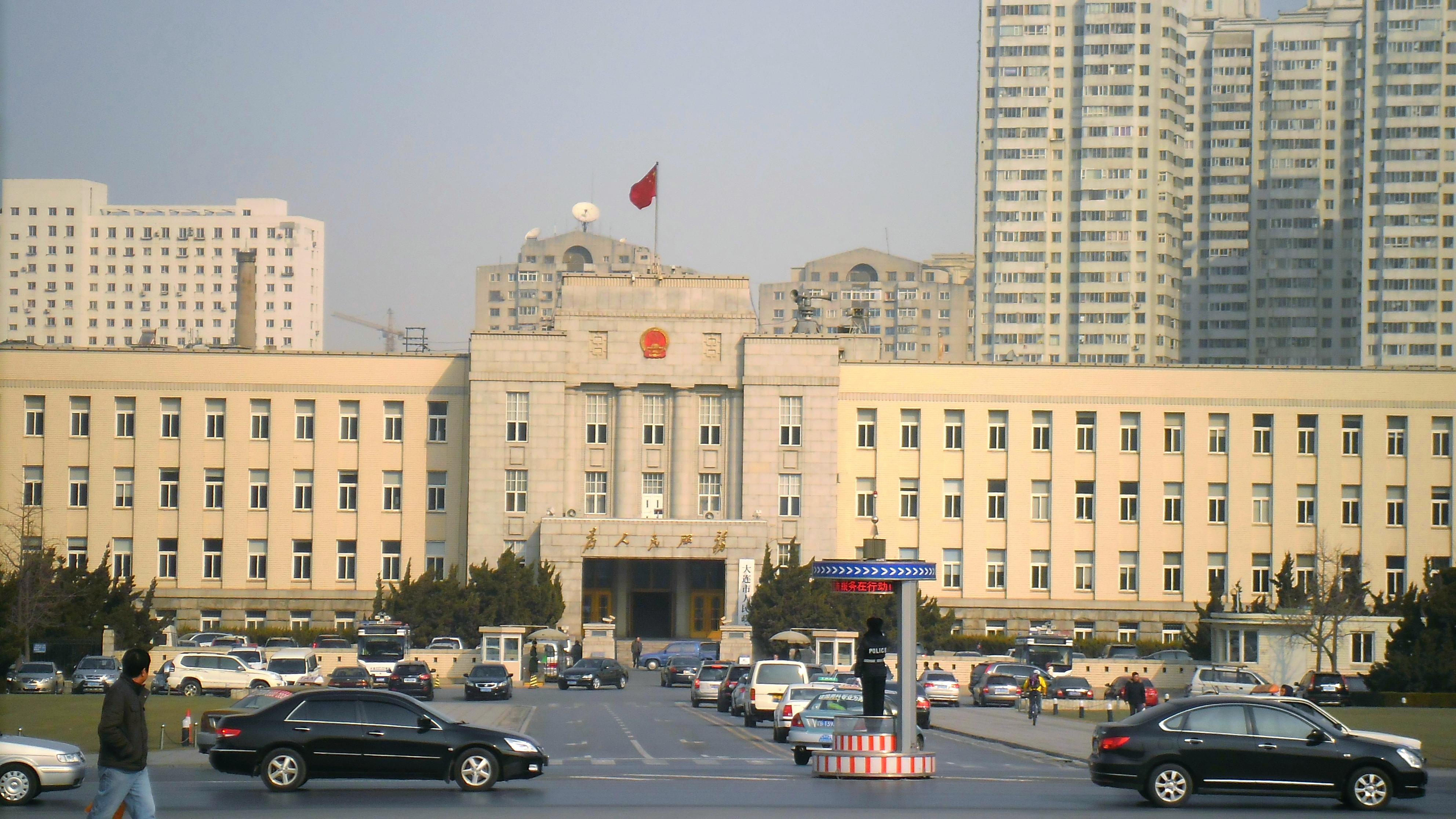 中文（中国大陆）: 辽宁省大连市